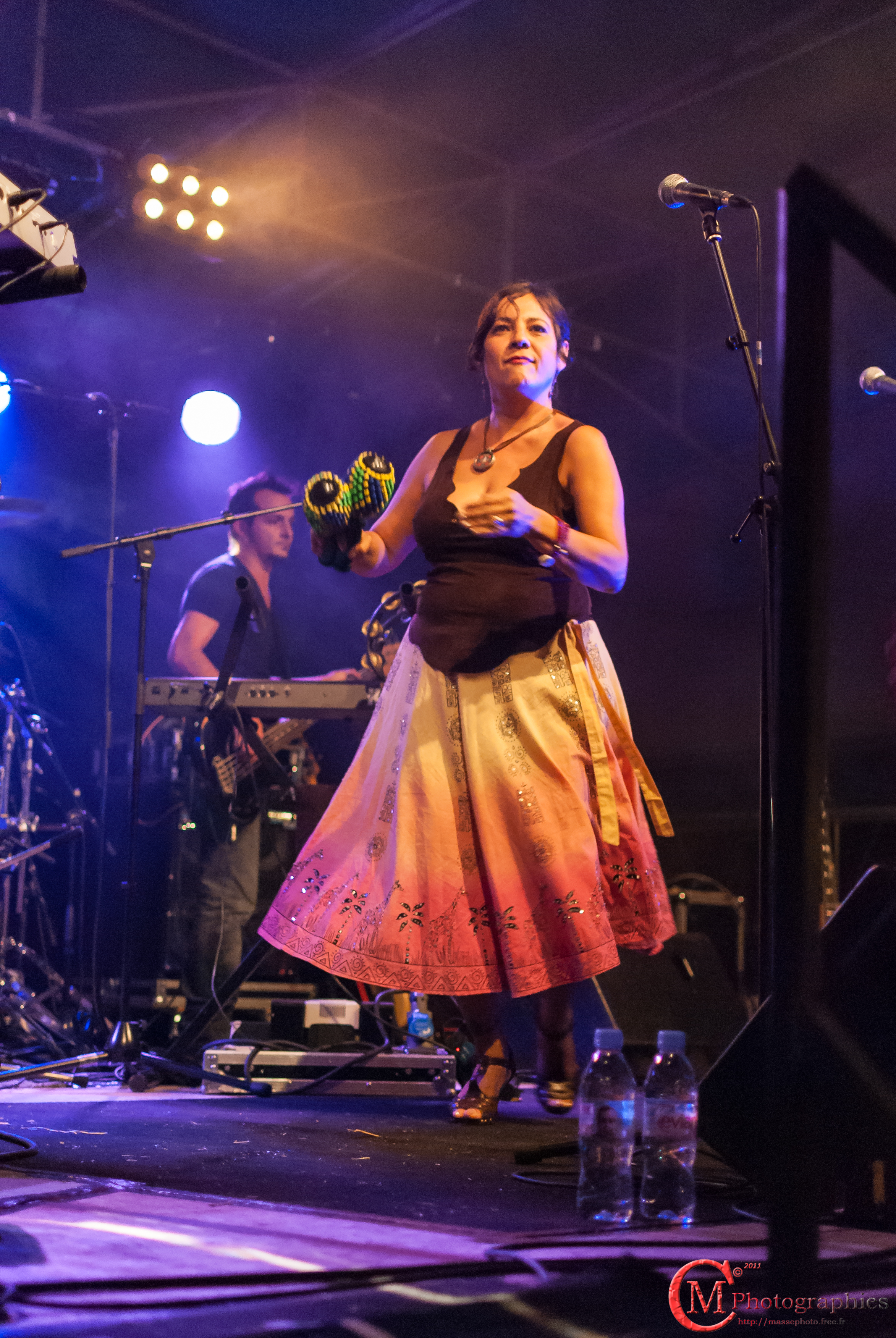 Concert de Cock Robin au Festival Montagne et Music.